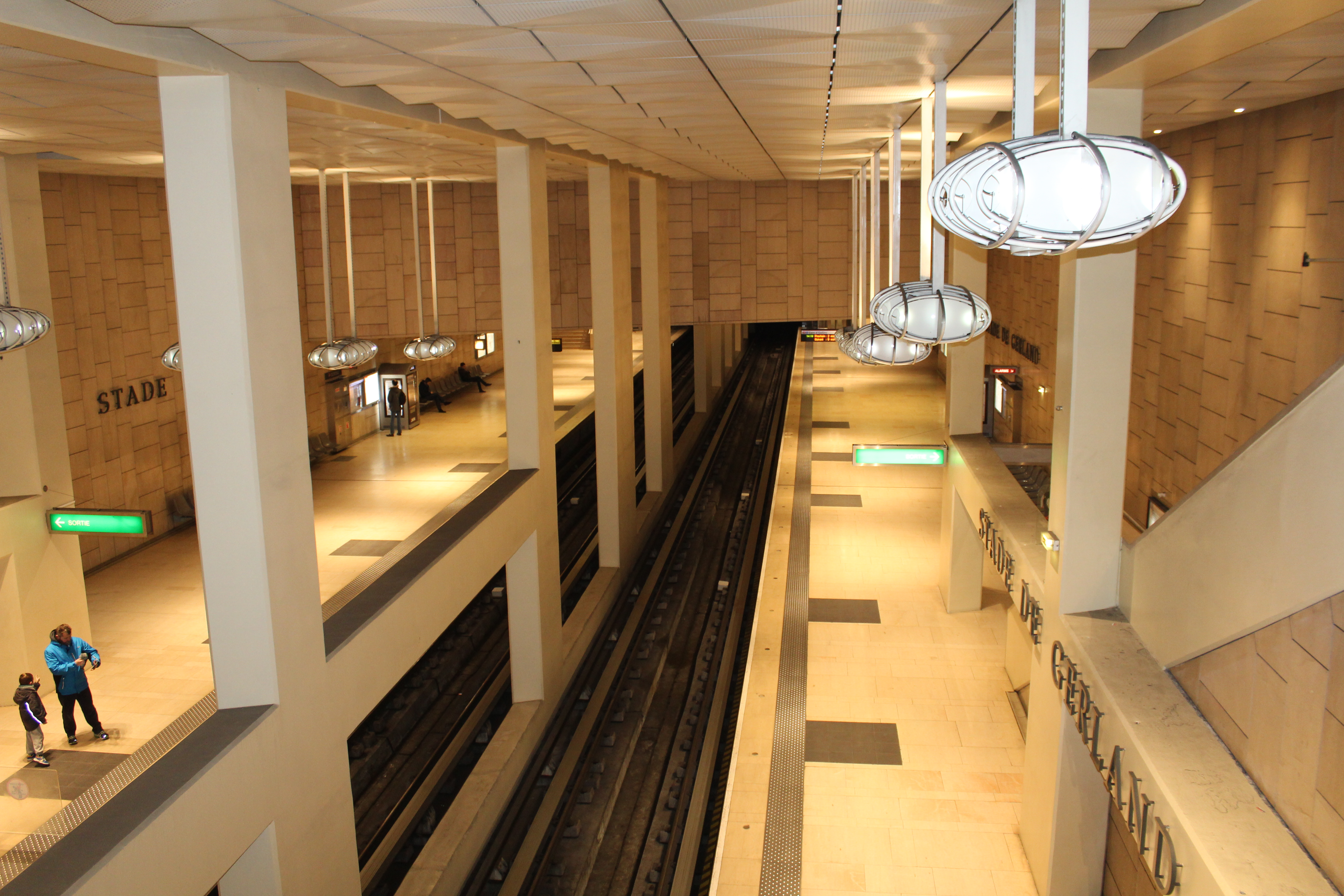 Station de métro Stade de Gerland, Lyon.